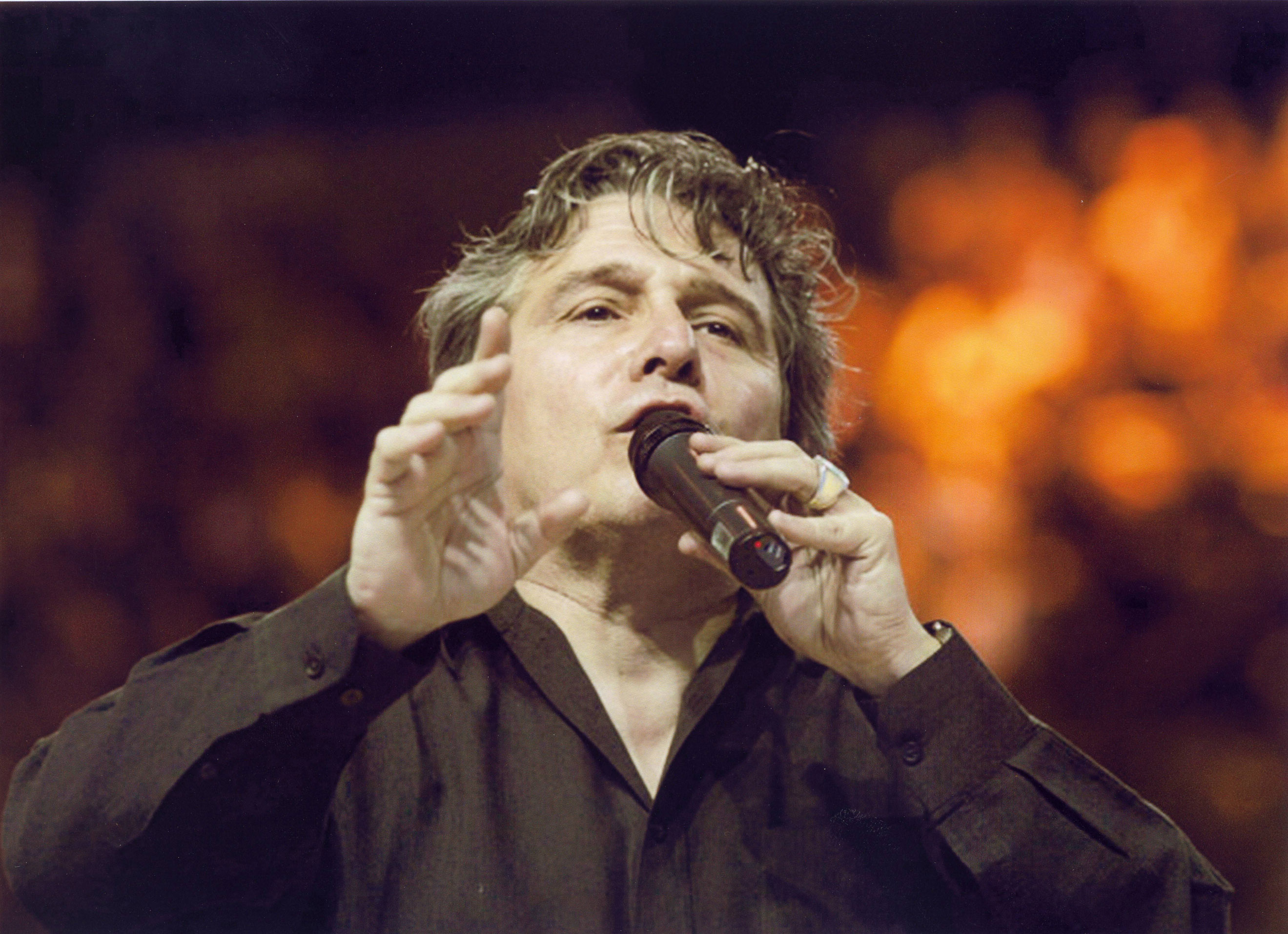 Michel Rouquette entraîneur national de trampoline (France)